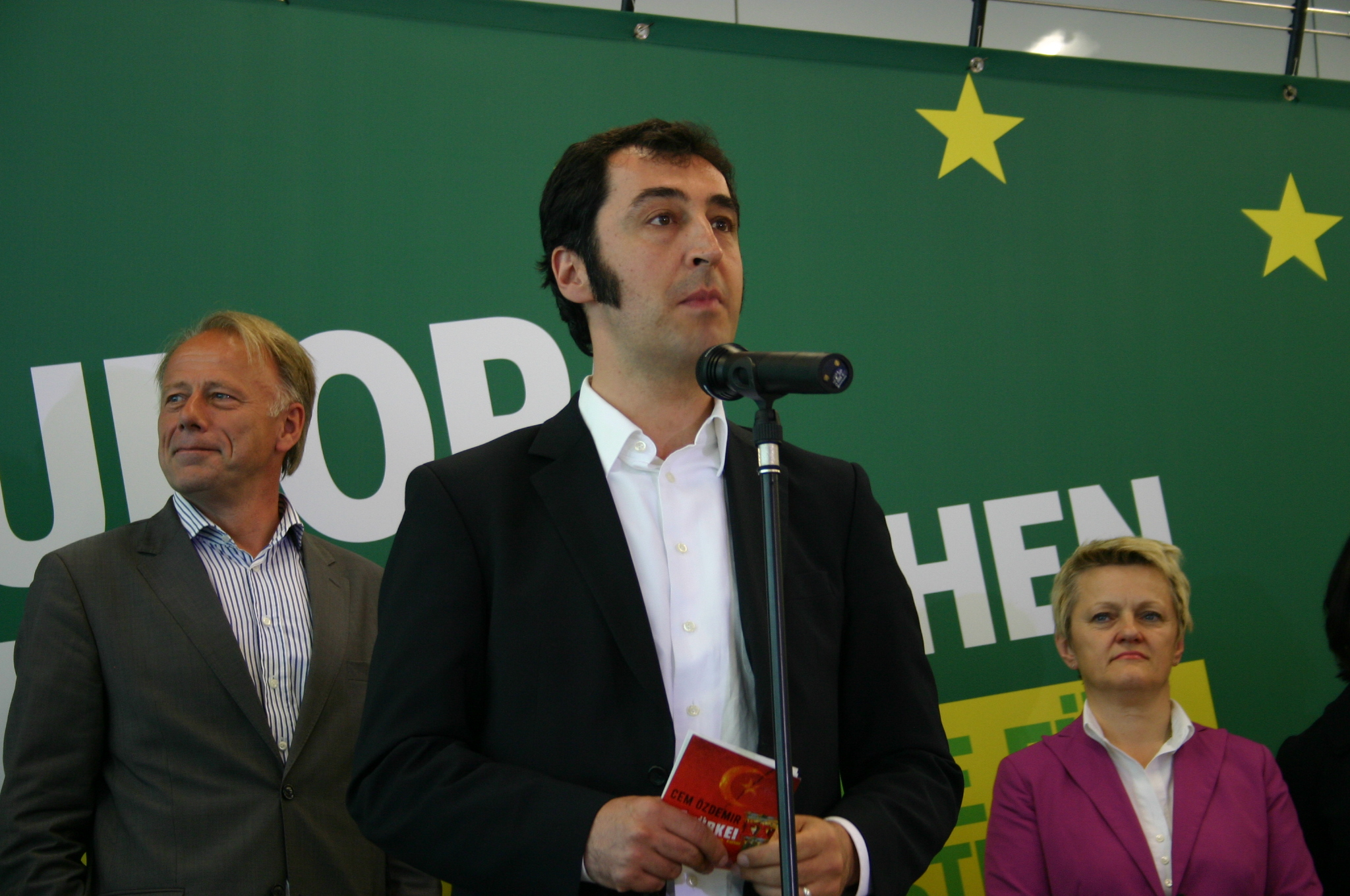 Cem Özdemir bei einer Veranstaltung von Bündnis 90/Die Grünen im Anschluß an die Europawahl 2009